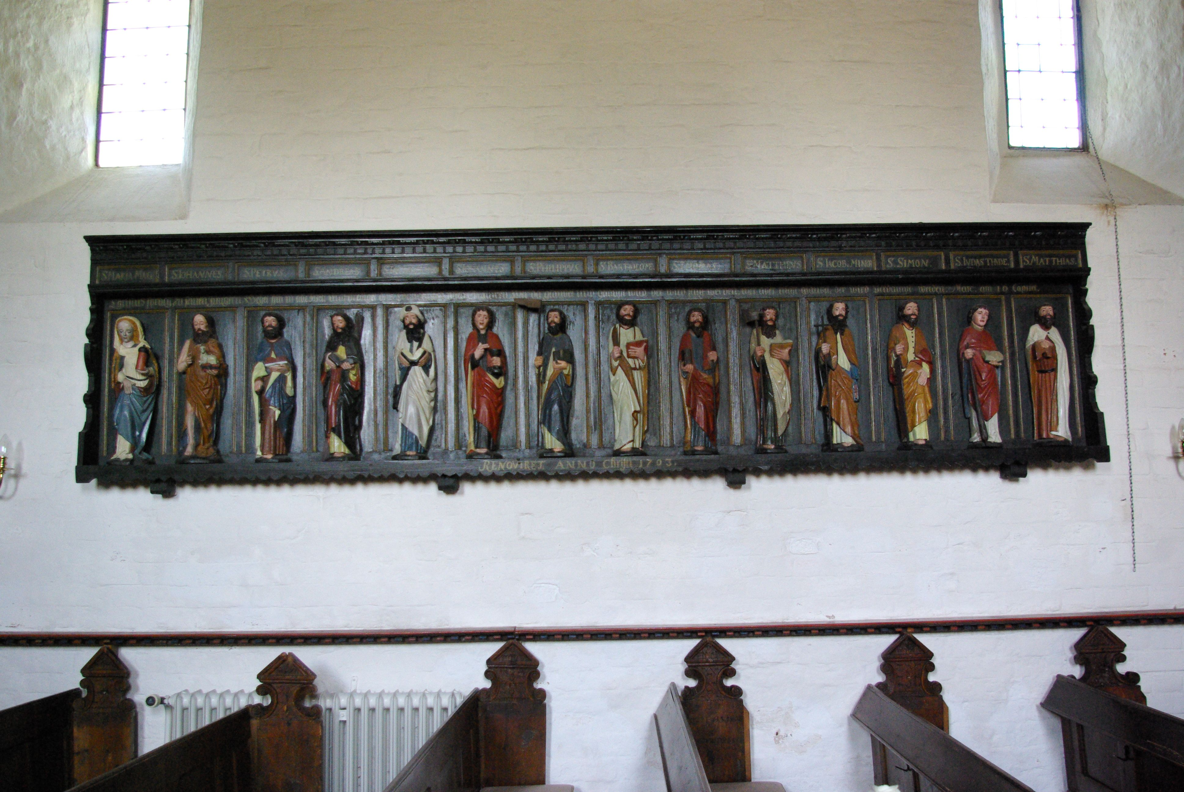 Husum, Stadtteil Schobüll, Die Kirche "Kirchlein am Meer", im Inneren die Figuren an der Nordwand (Geotag in den Exif-Daten).